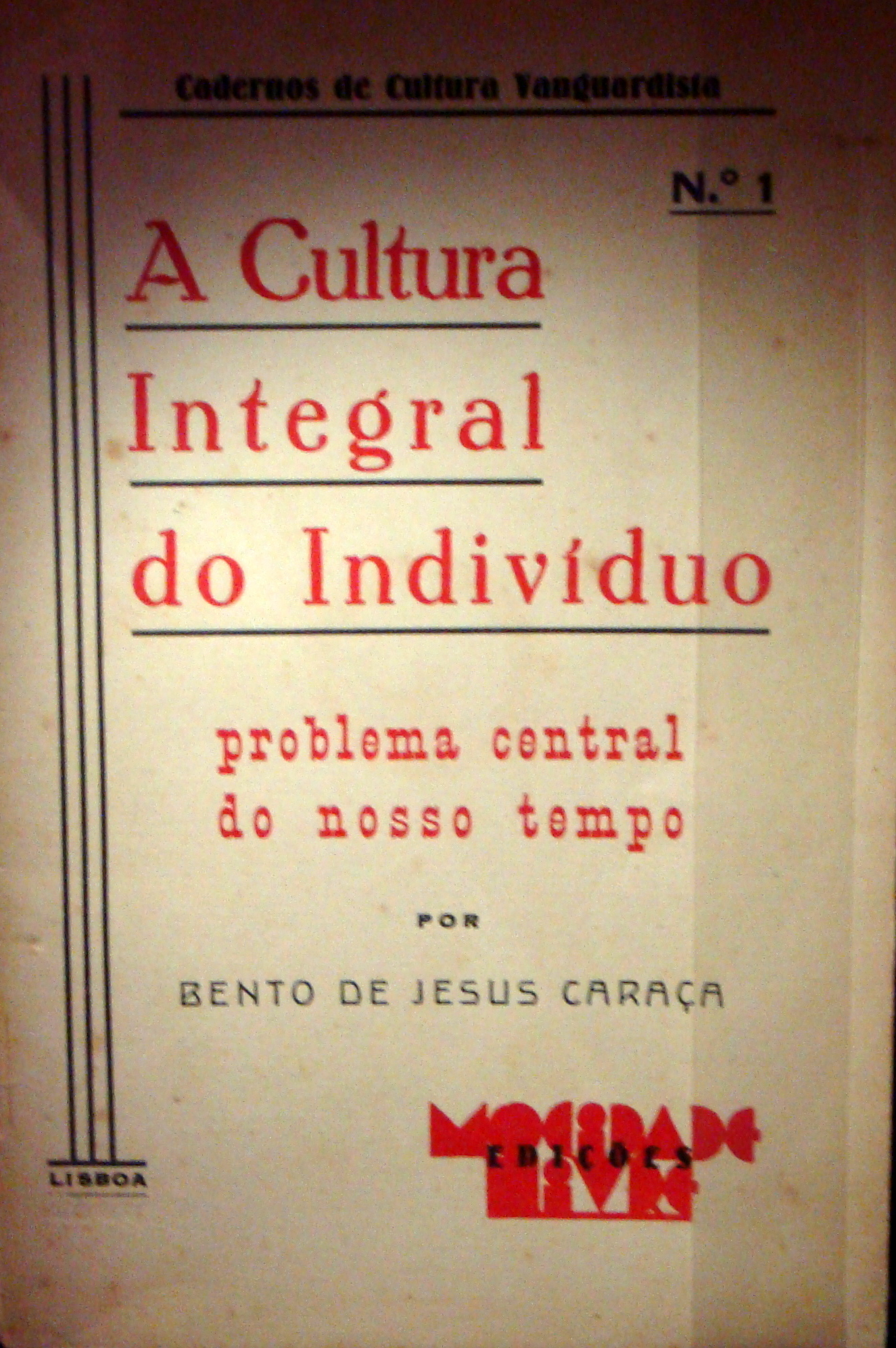 Capa de livro de Bento de Jesus Caraça